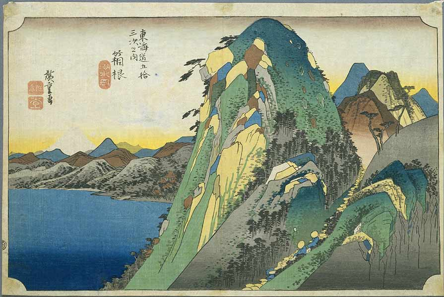 *Estampe nommée "Le lac d'Hakone" ("Lake Hakone") peinte par Hiroshige